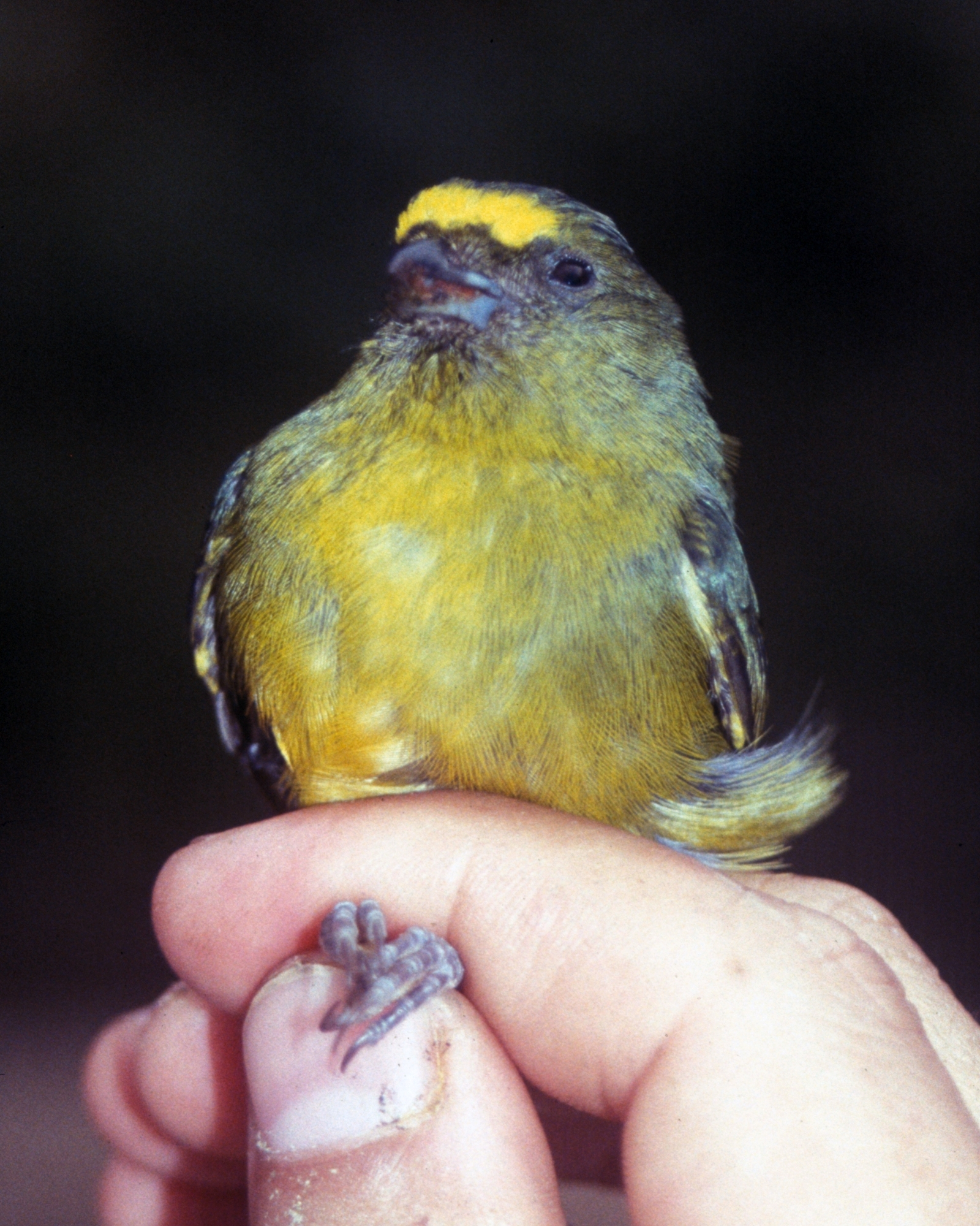 Bronze-green Euphonia (Euphonia mesochrysa). Male from Cordillera del Cóndor, Ecuador.